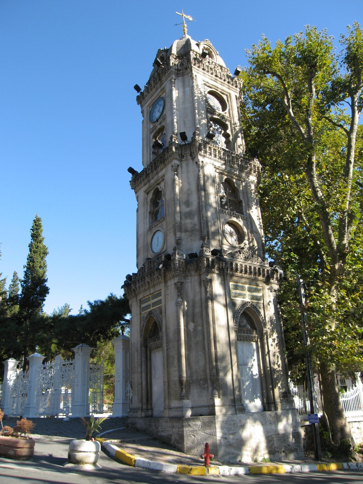 Yıldız Clock Tower in Beşiktaş district of Istanbul, Turkey.